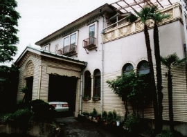 もと市橋医院